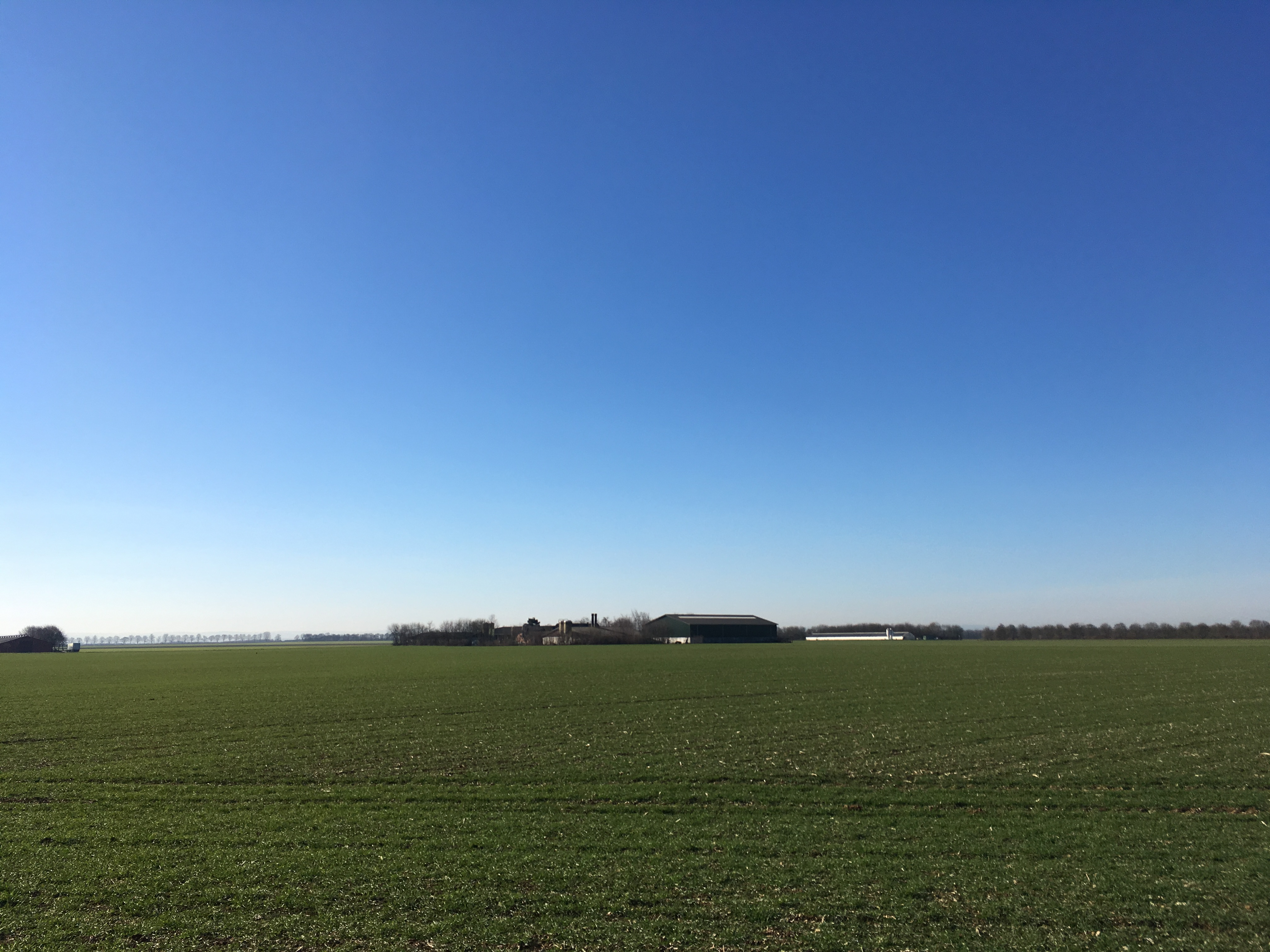 Die Berrenrather Börde ist eine Kulturlandschaft, die durch einen Braunkohle-Tagebau entstand. Sie liegt in Hürth, einer Stadt im Rhein-Erft-Kreis im Land NRW.